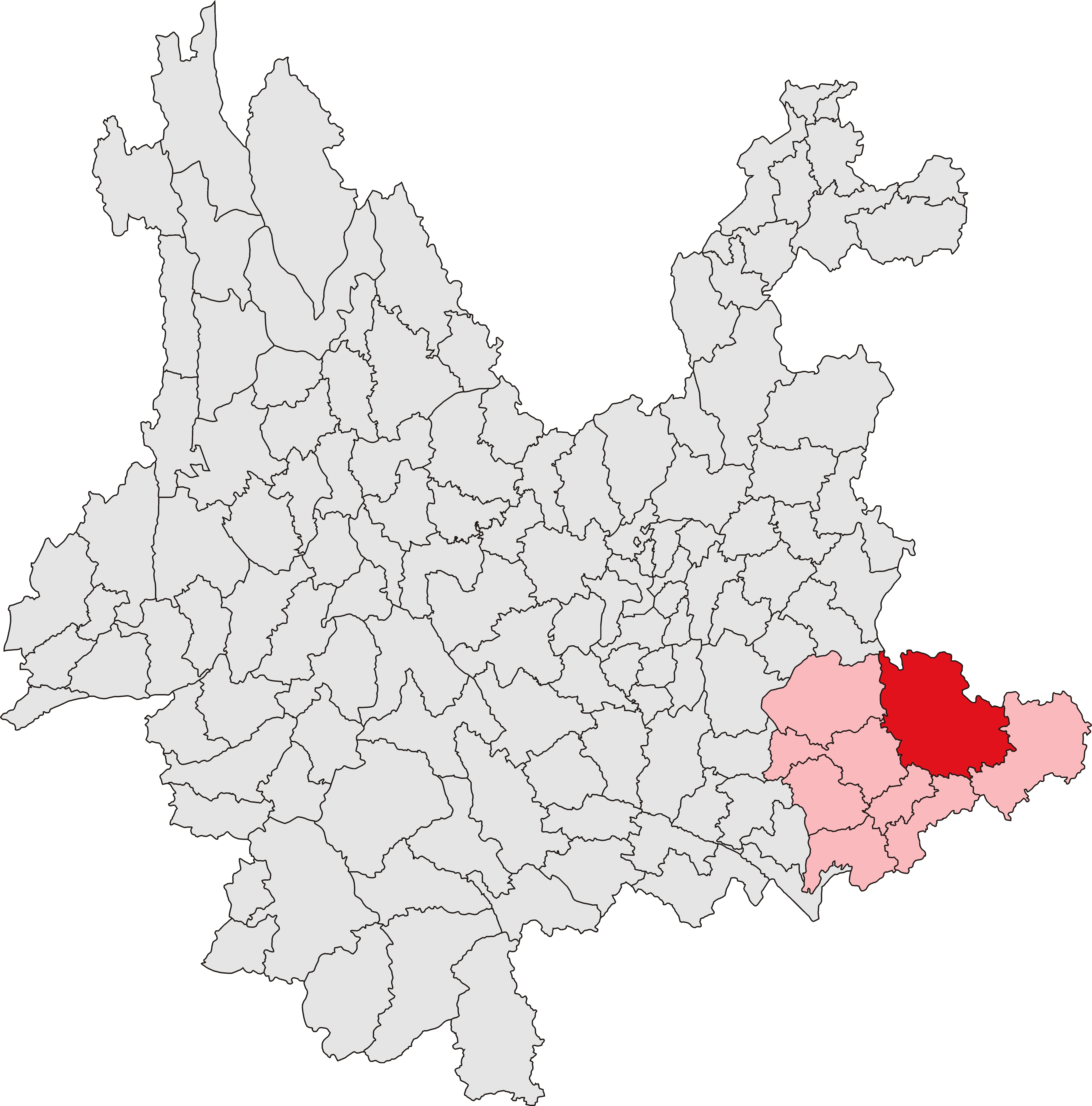 中文（中国大陆）: 广南县位置图